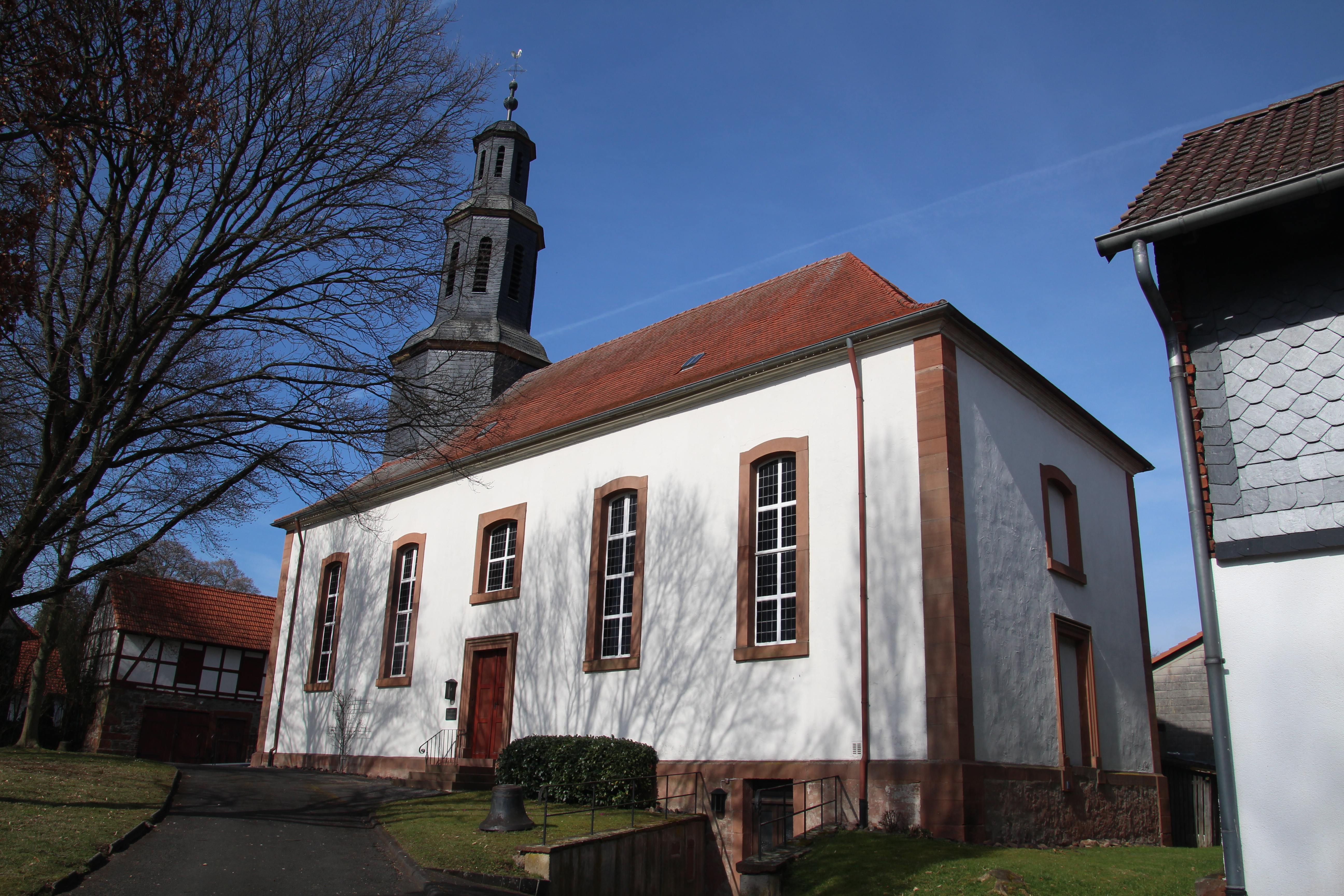 Siehe Bild und Dateiname